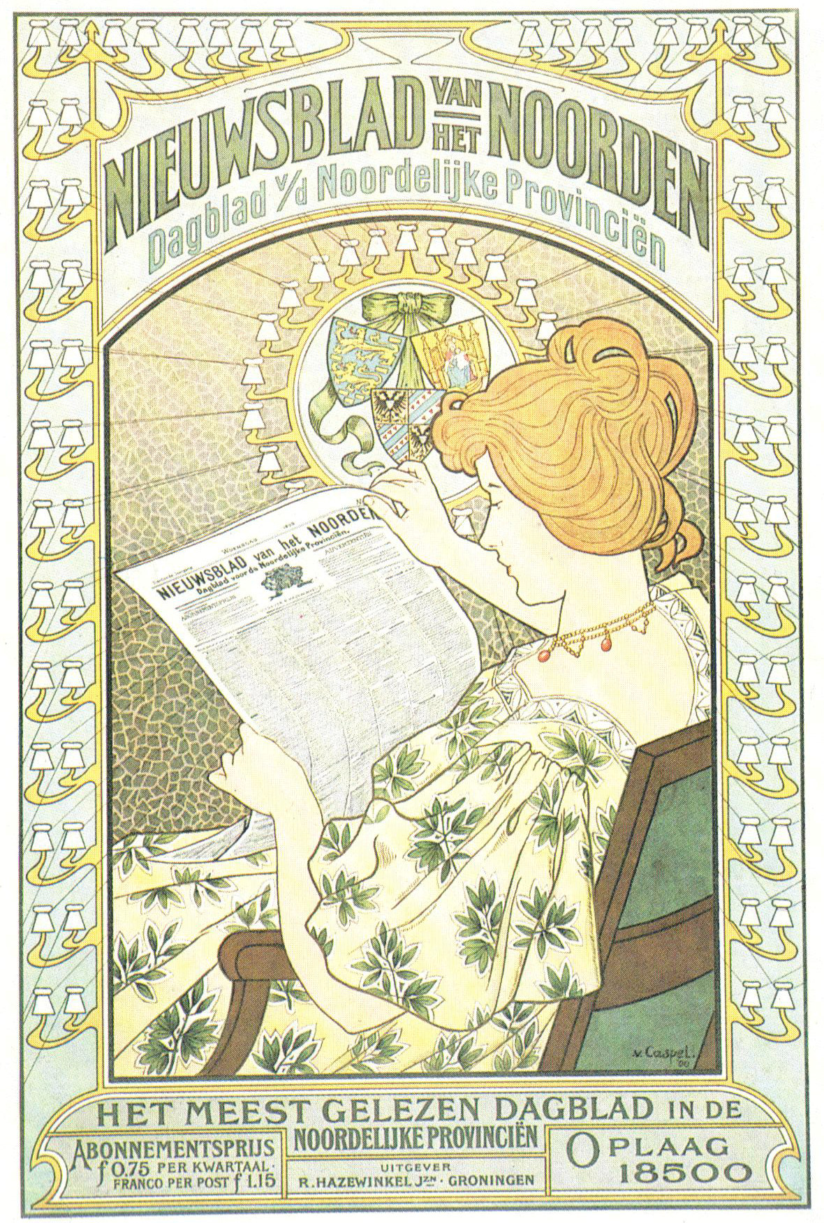 Affiche. "Nieuwsblad van het Noorden. Dagblad v/d Noordelijke Provinciën."